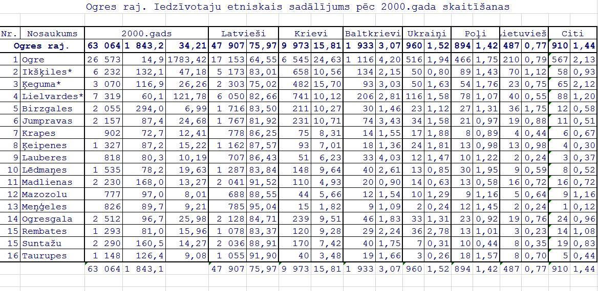 результаты переписи населения Латвии ни 01.04.2000